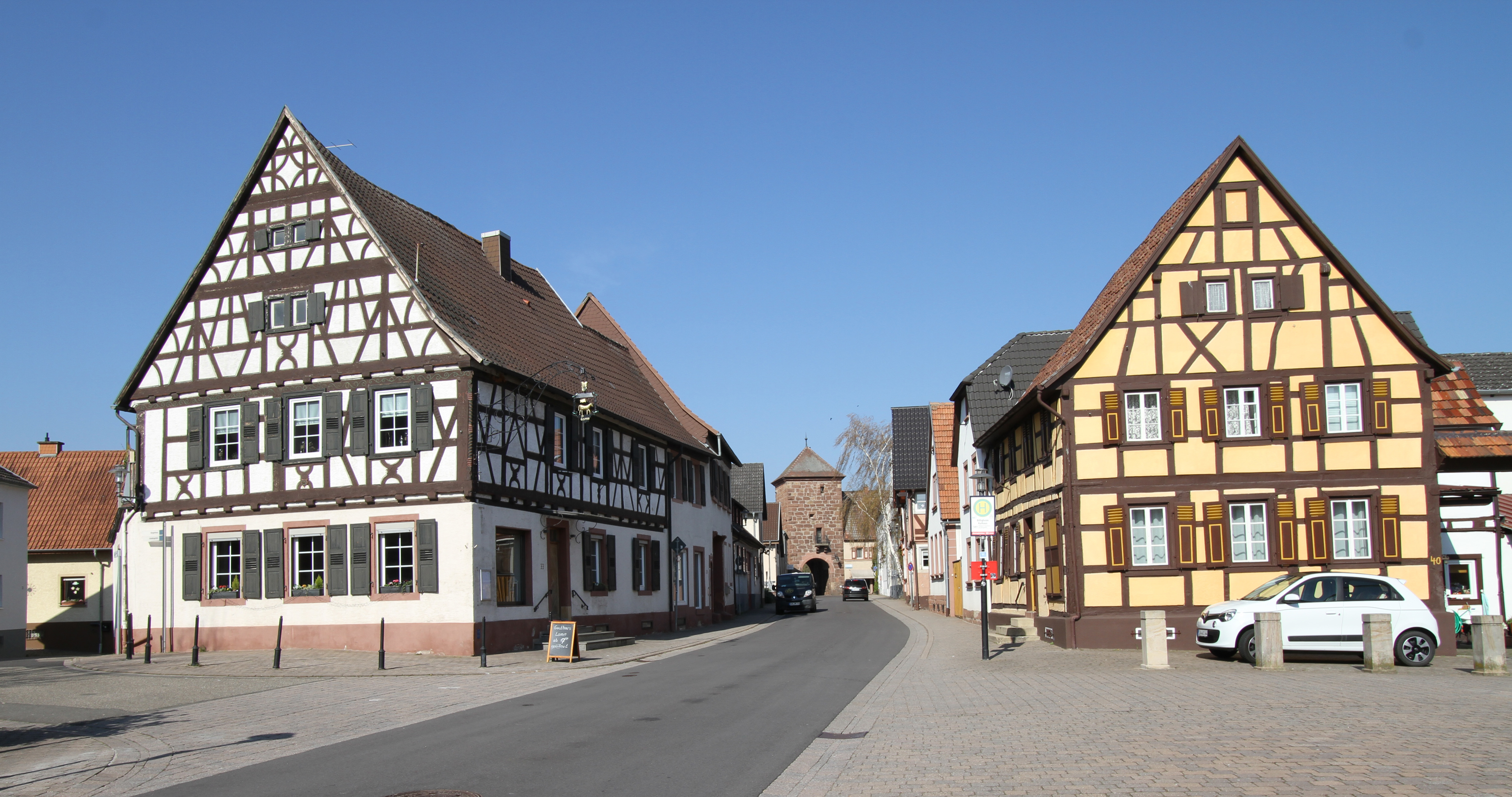 Billigheim